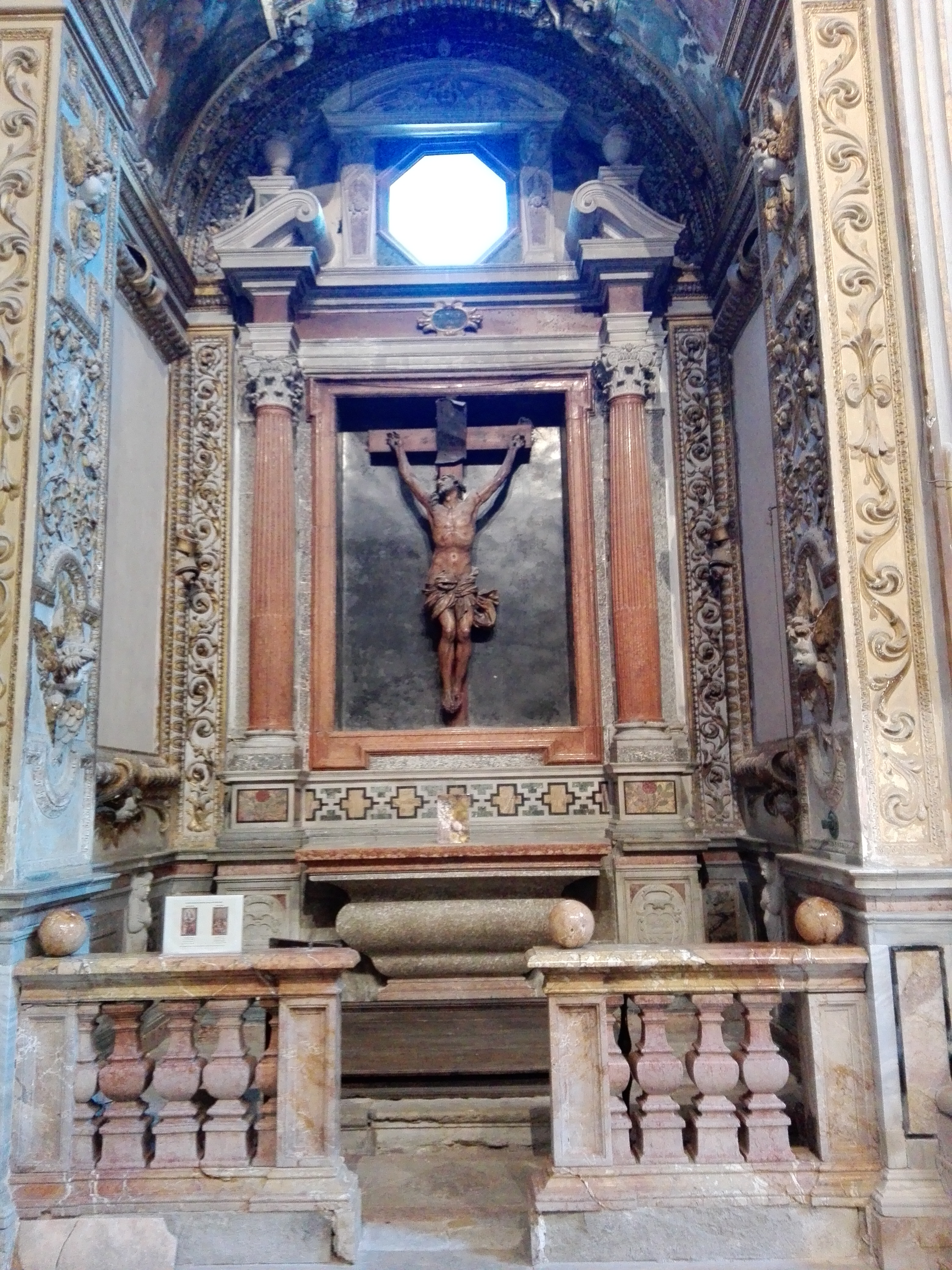 Chiesa